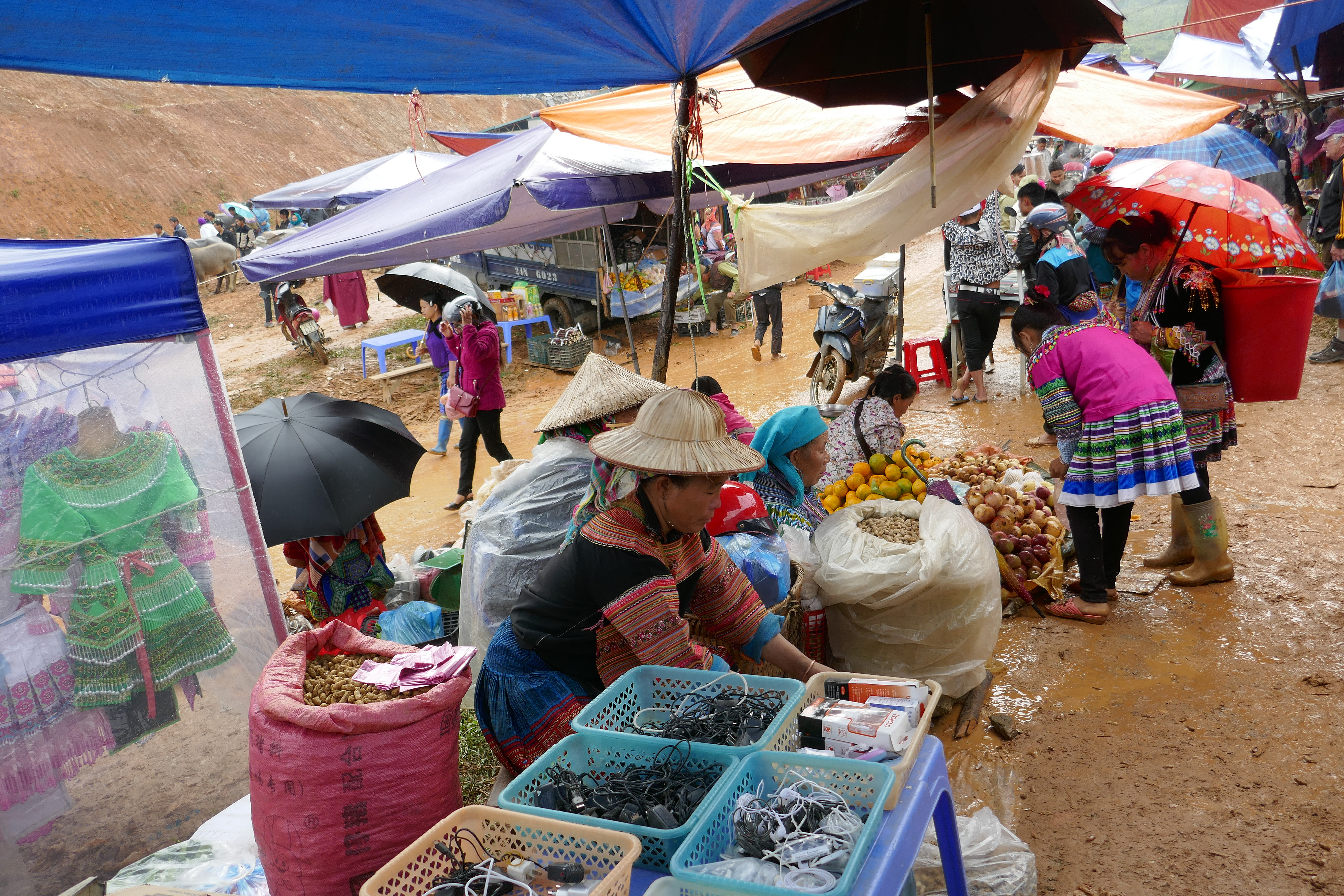 Marché de Coc Ly dans la Province de Lào Cai au nord du Viêt Nam.